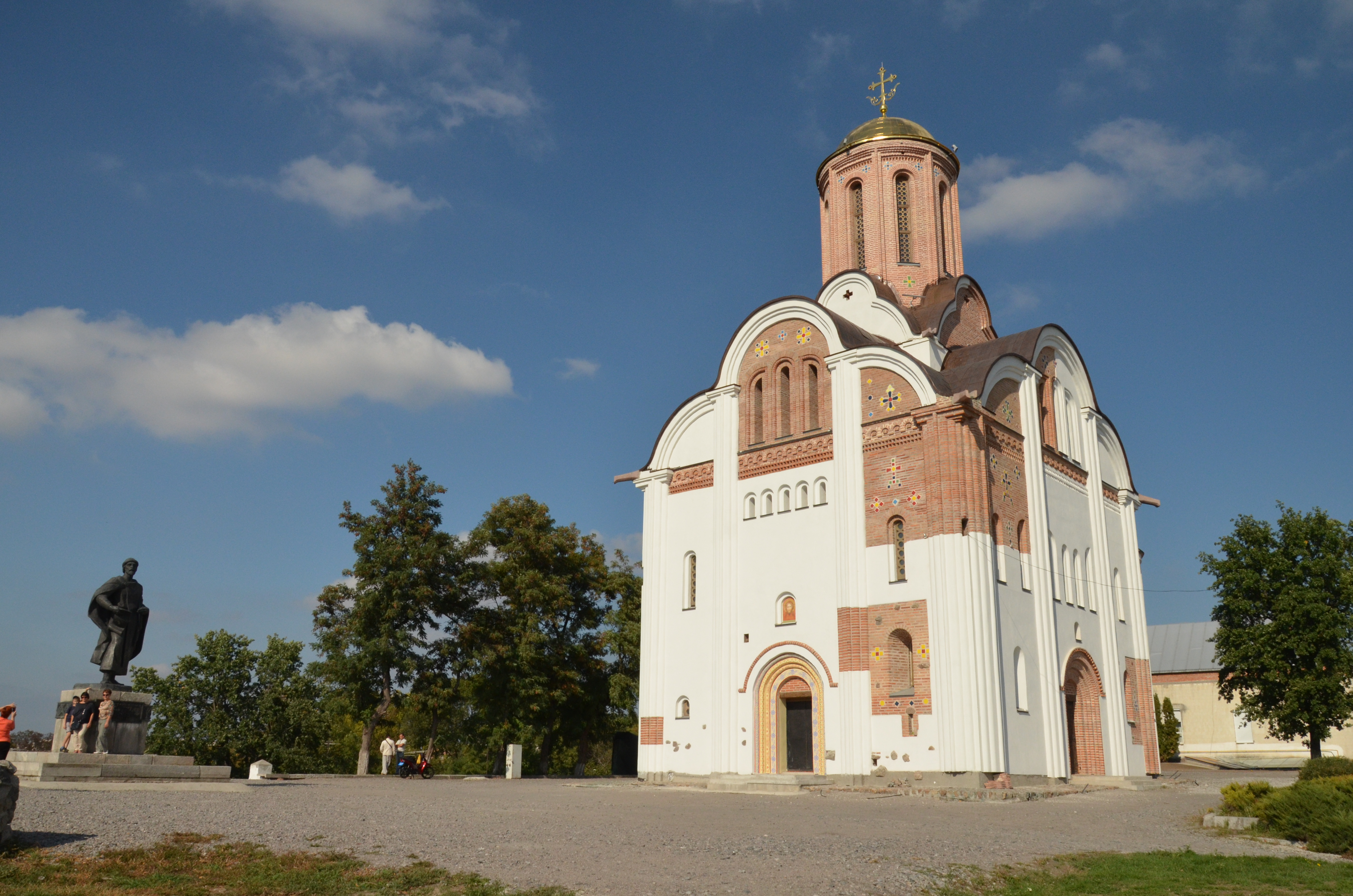 Городище літописного міста Юр'єва, Біла Церква, Замкова гора